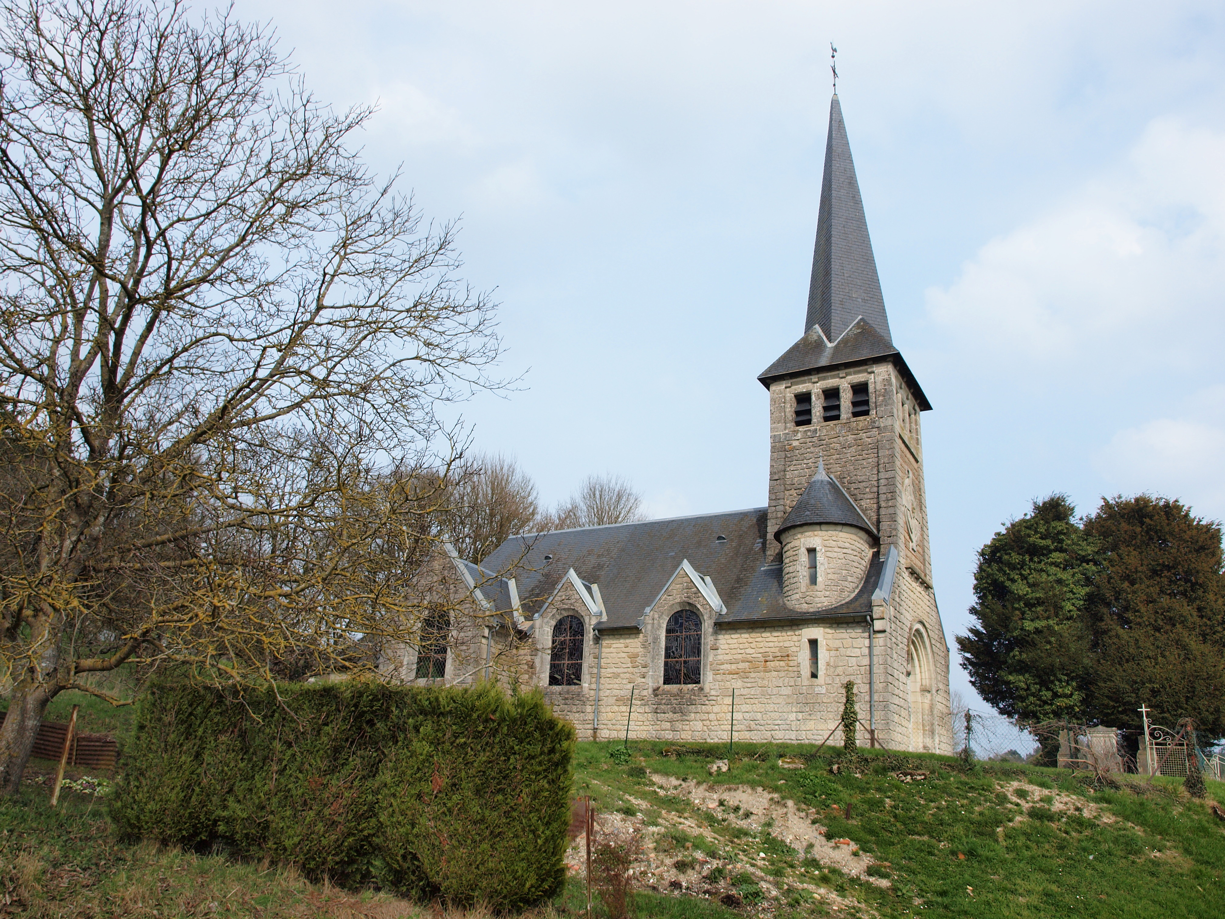 Fontaine-en-Dormois (Marne, France)